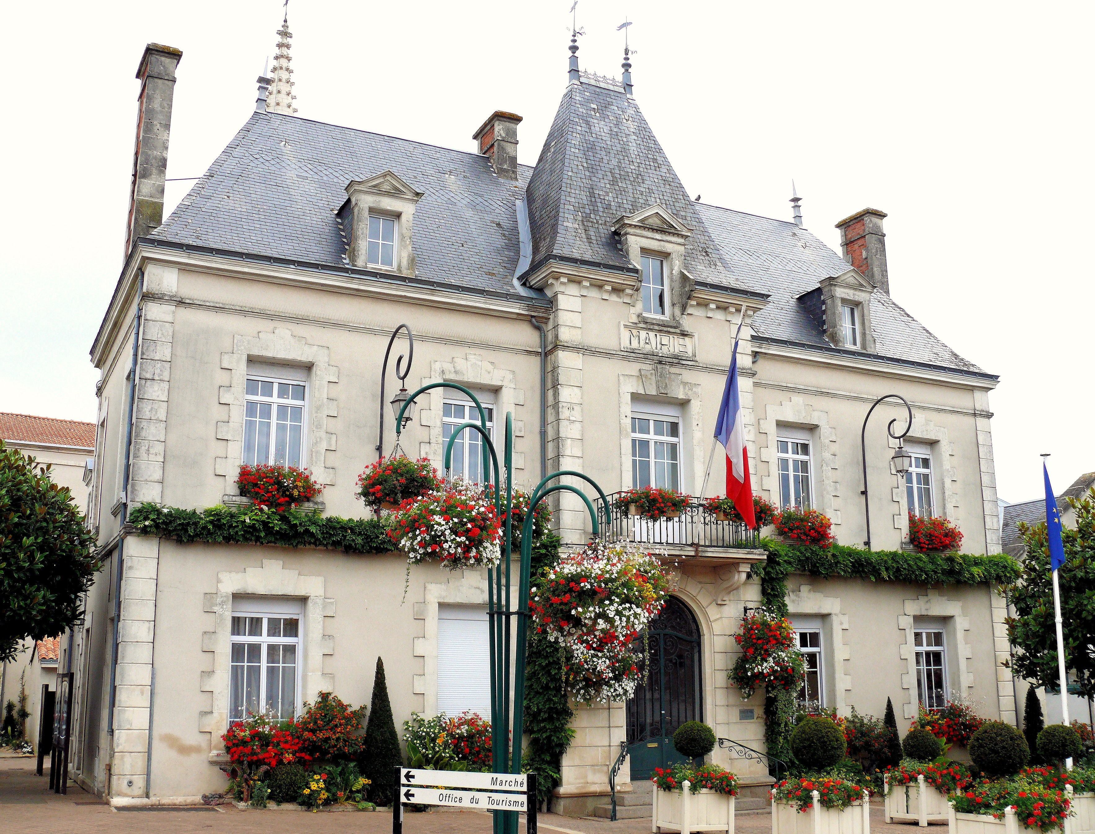 Chantonnay - Hôtel de ville